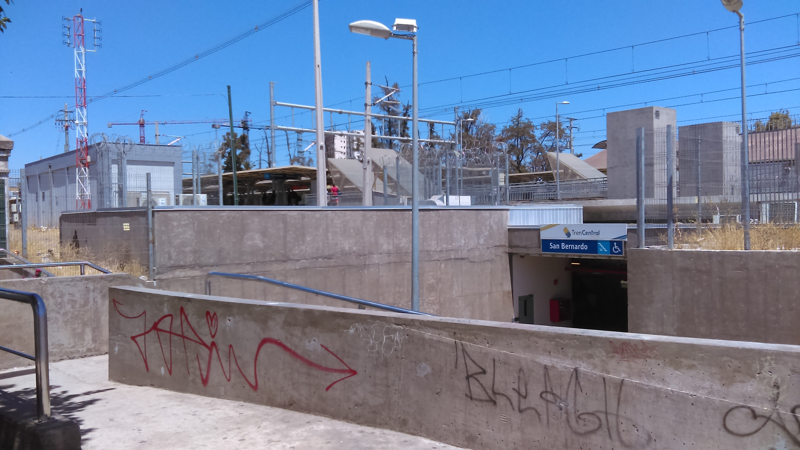 Ingreso oriente a la estación de ferrocarriles de San Bernardo, 2019.